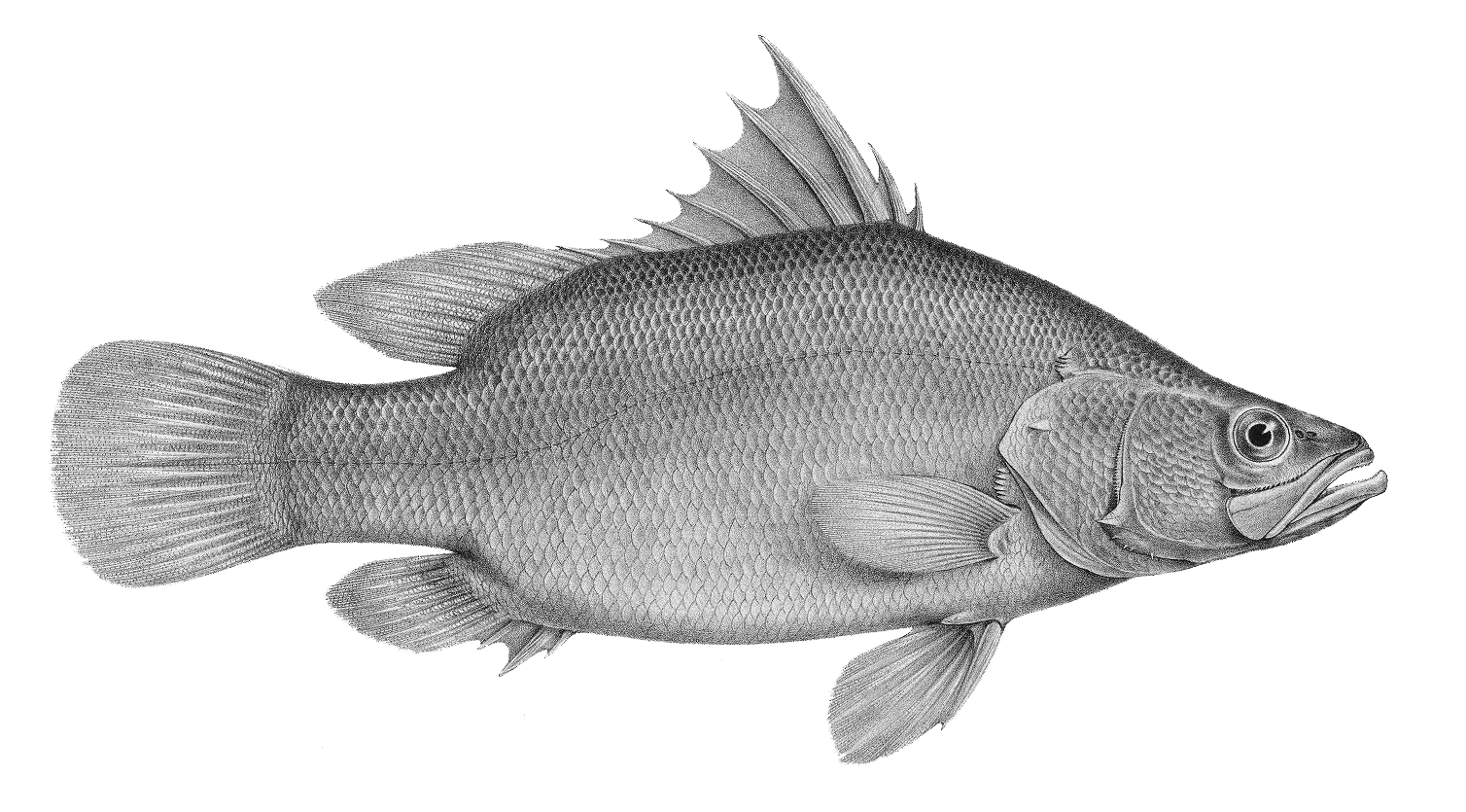 Lates niloticus